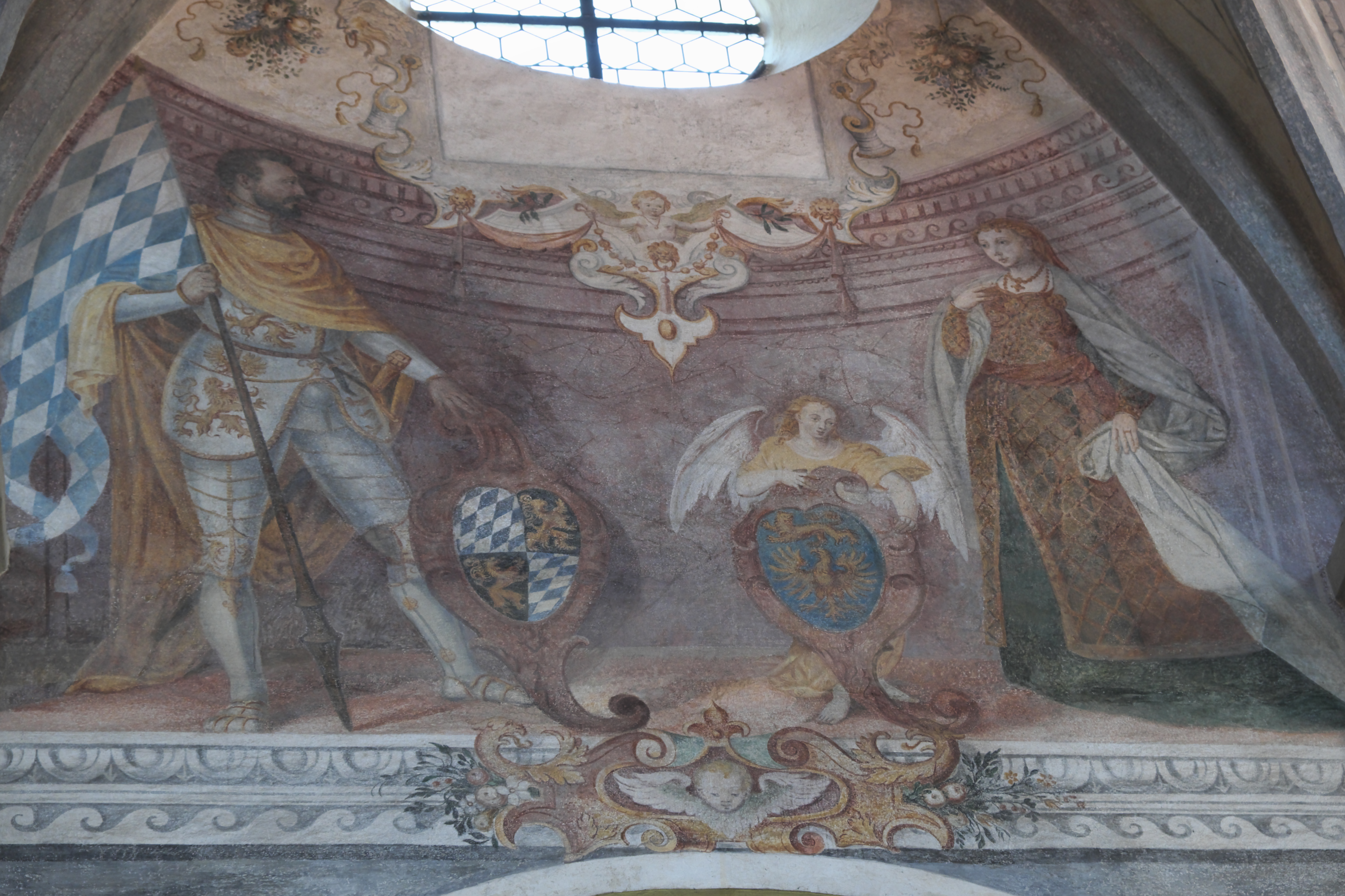 Katholische Pfarrkirche, ehemalige Benediktinerklosterkirche St. Lambert in Klosterseeon, einem Ortsteil von Seeon-Seebruck im Landkreis Traunstein (Bayern/Deutschland), Fresken von 1625-1630, Darstellung: Stifterpaar Aribo I. und seine Gemahlin Adala von Bayern